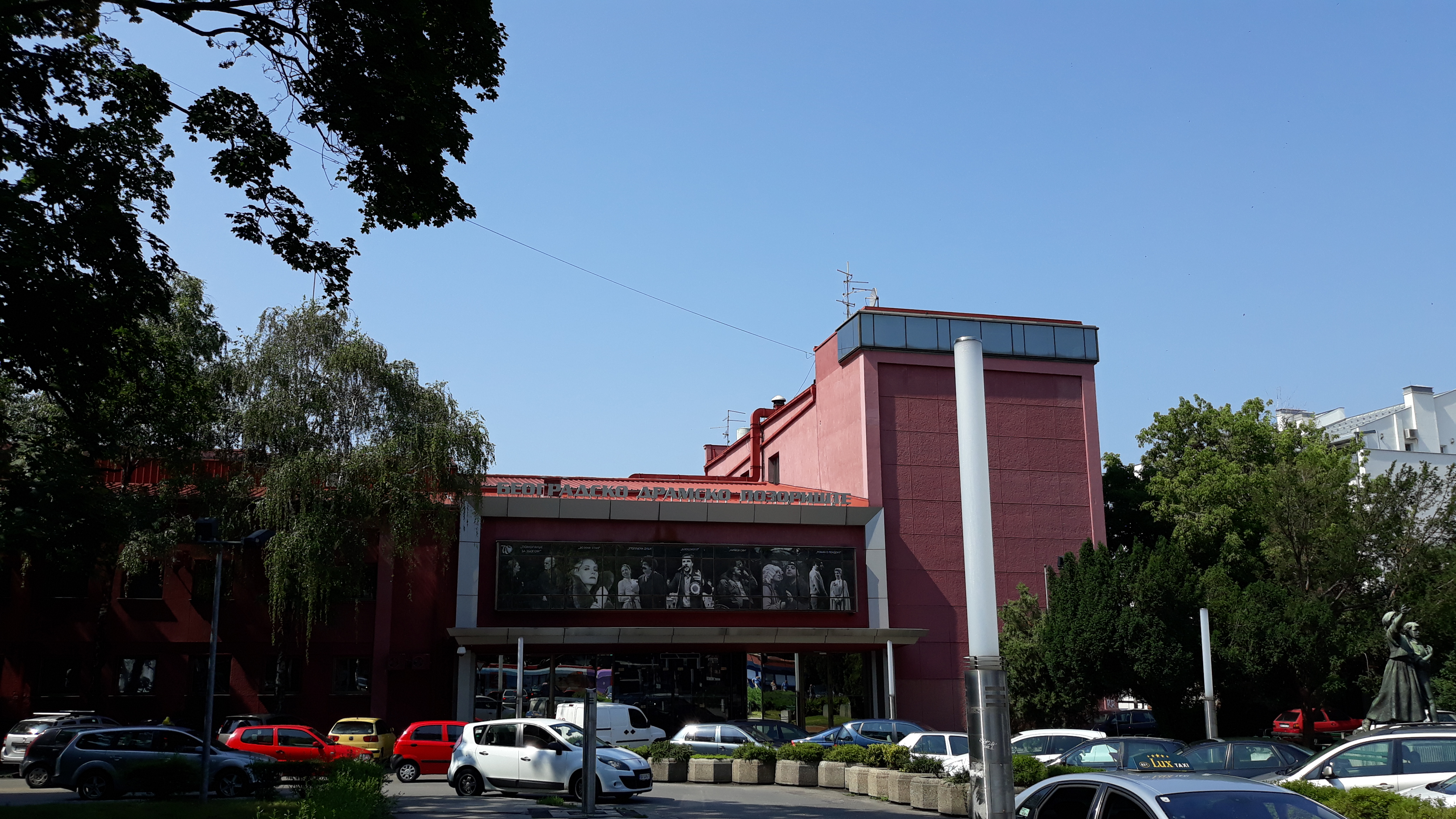 Београдско драмско позориште